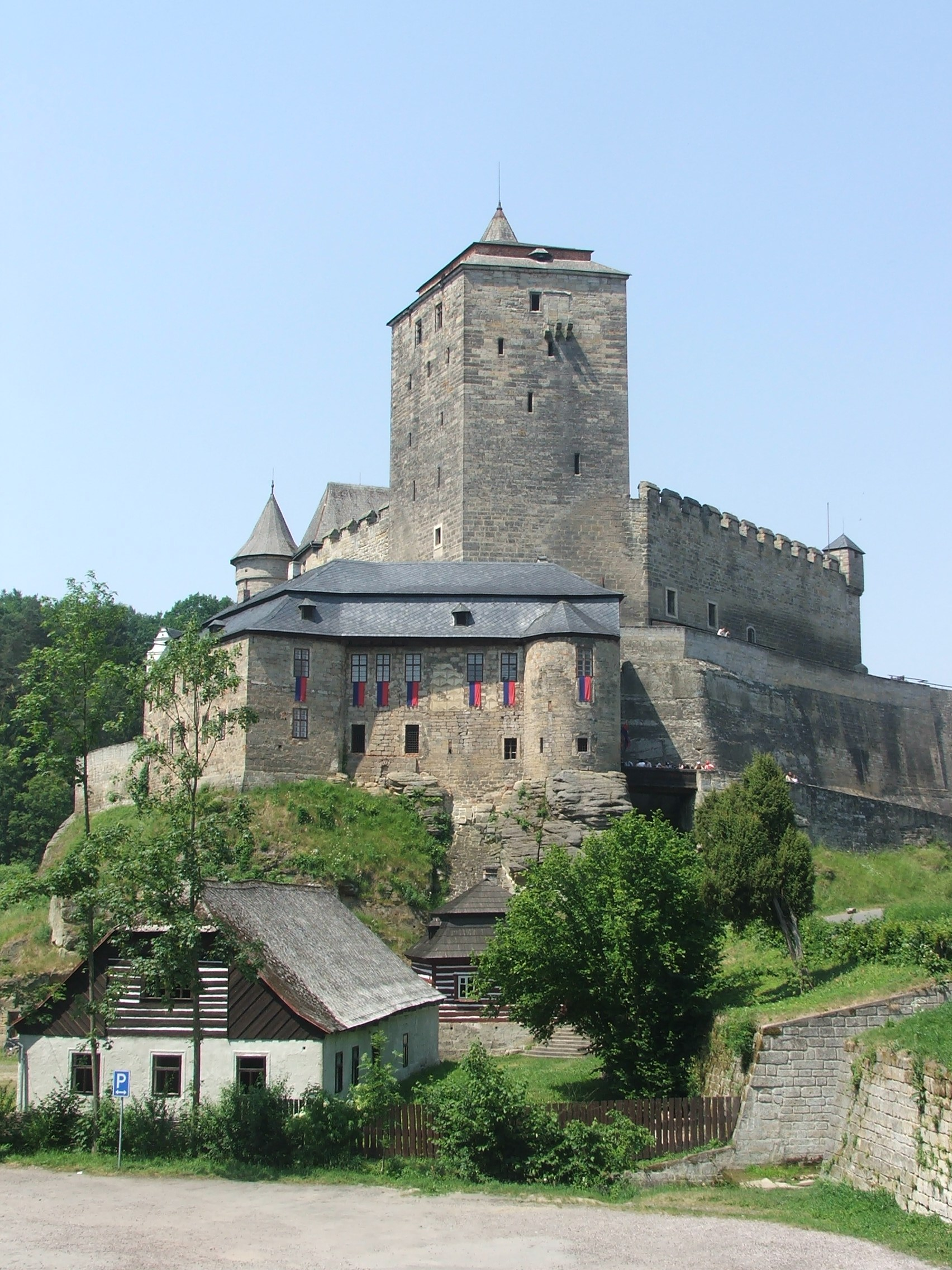 Kost Castle in Czechia